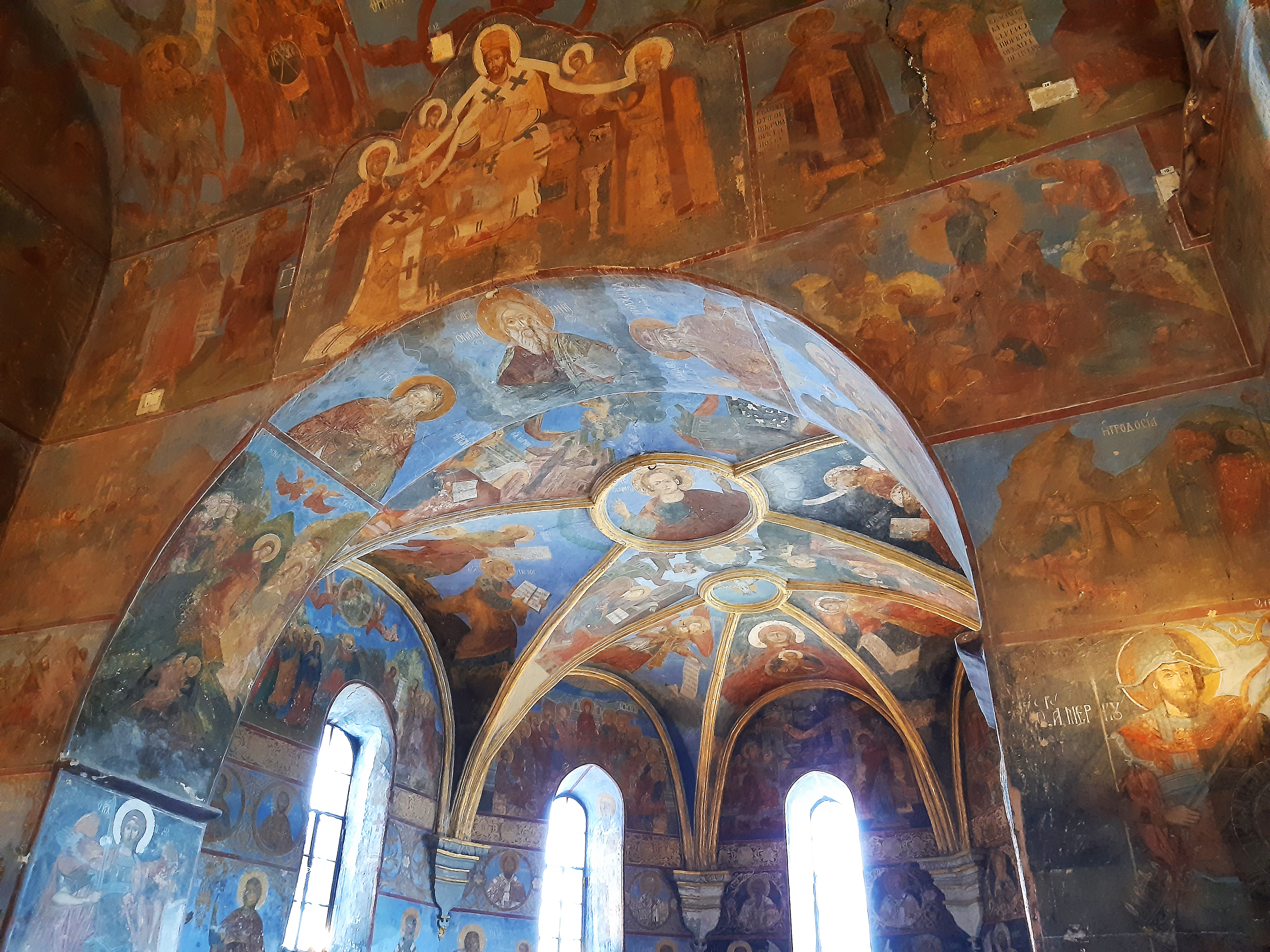 Фрески після реставрації 2017-2019 років. Церква Спаса на Берестові, Київ, вул. Лаврська, 5